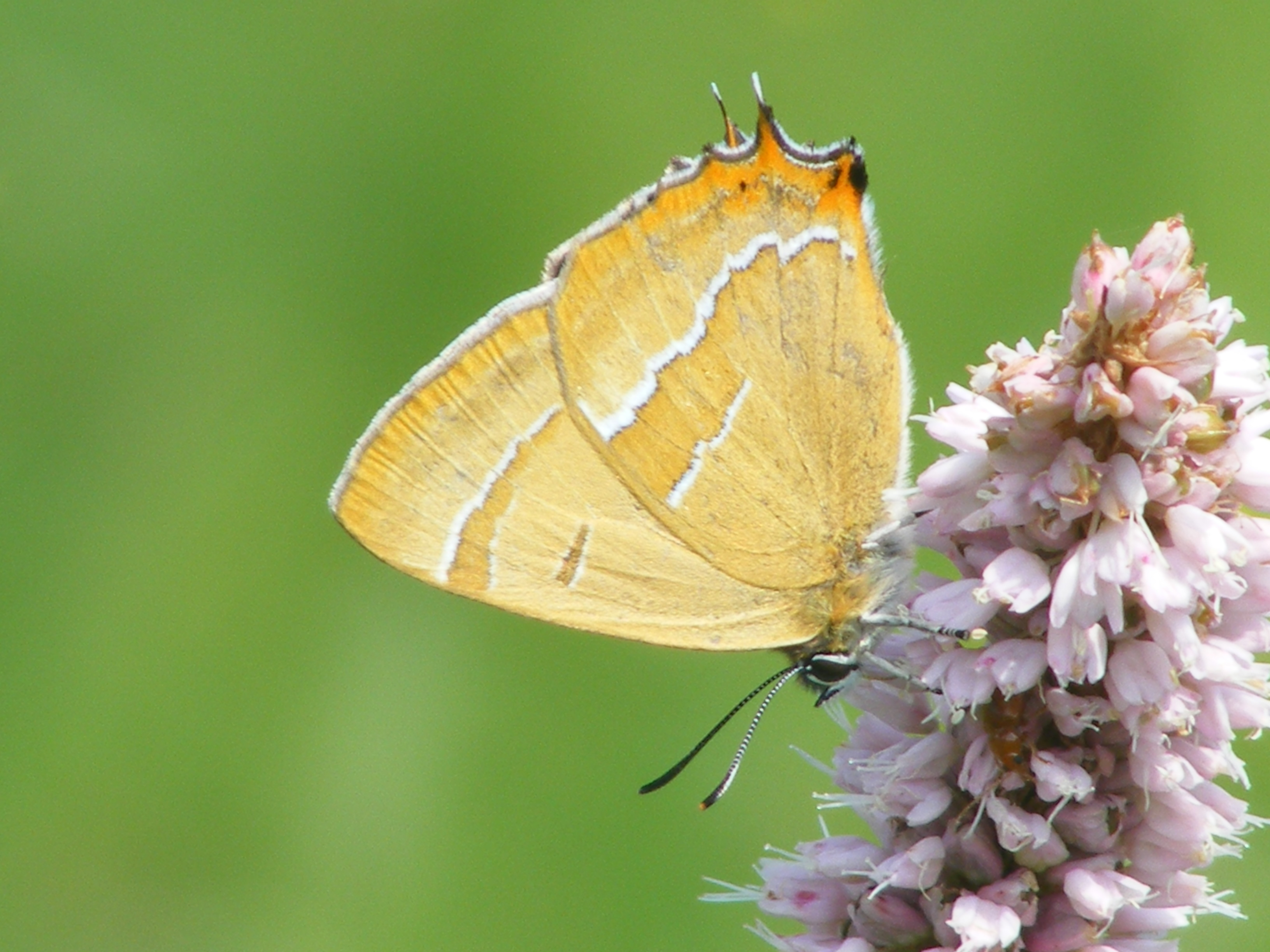 Pazik brzozowiec (Thecla betulae), motyl dzienny z rodziny modraszkowatych